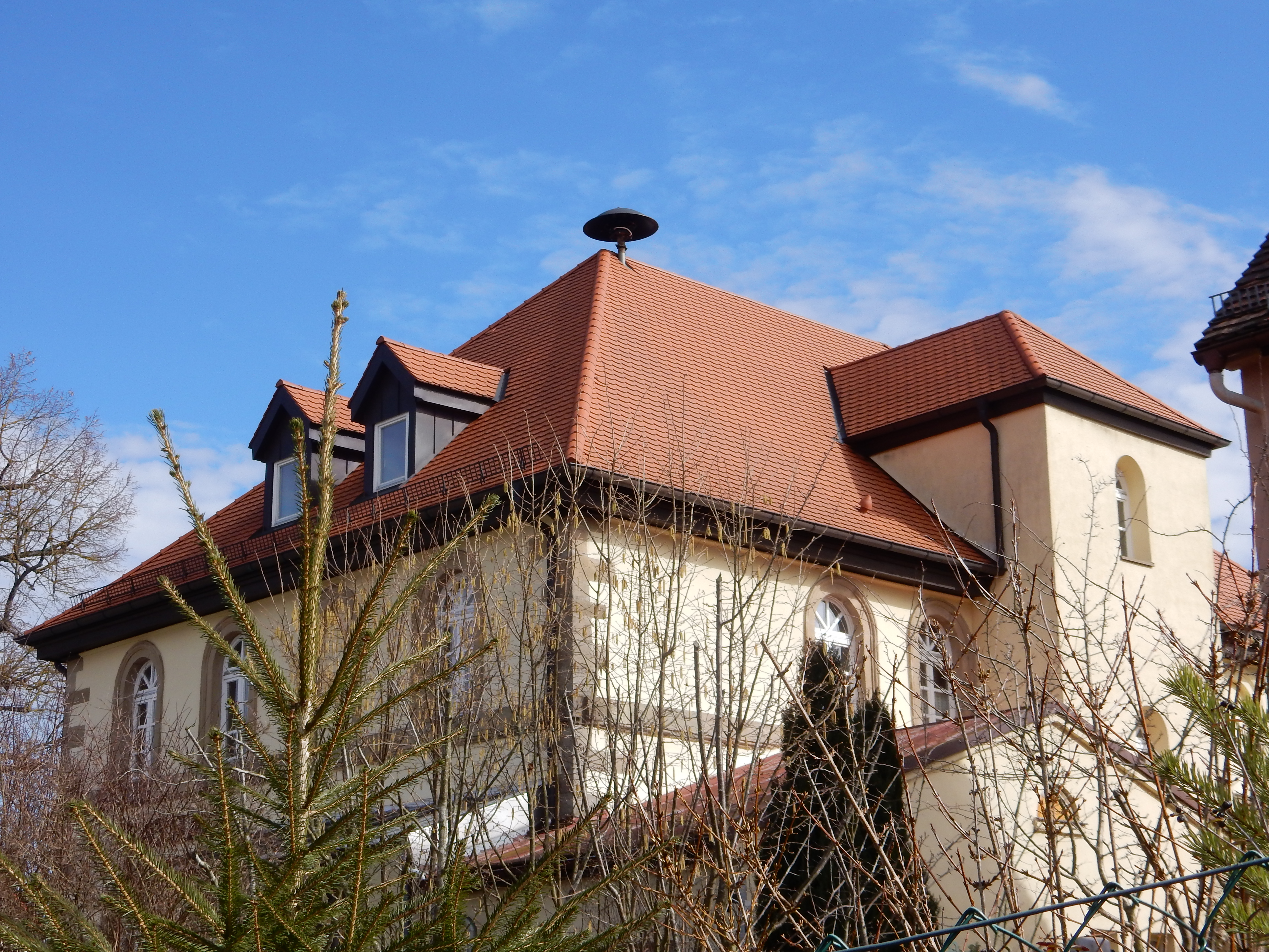 Rathausplatz 1 Ehemalige Schule, jetzt Rathaus Zweigeschossiger Walmdachbau mit Fassadengliederung im Maximiliansstil, 1842 D-5-71-132-3